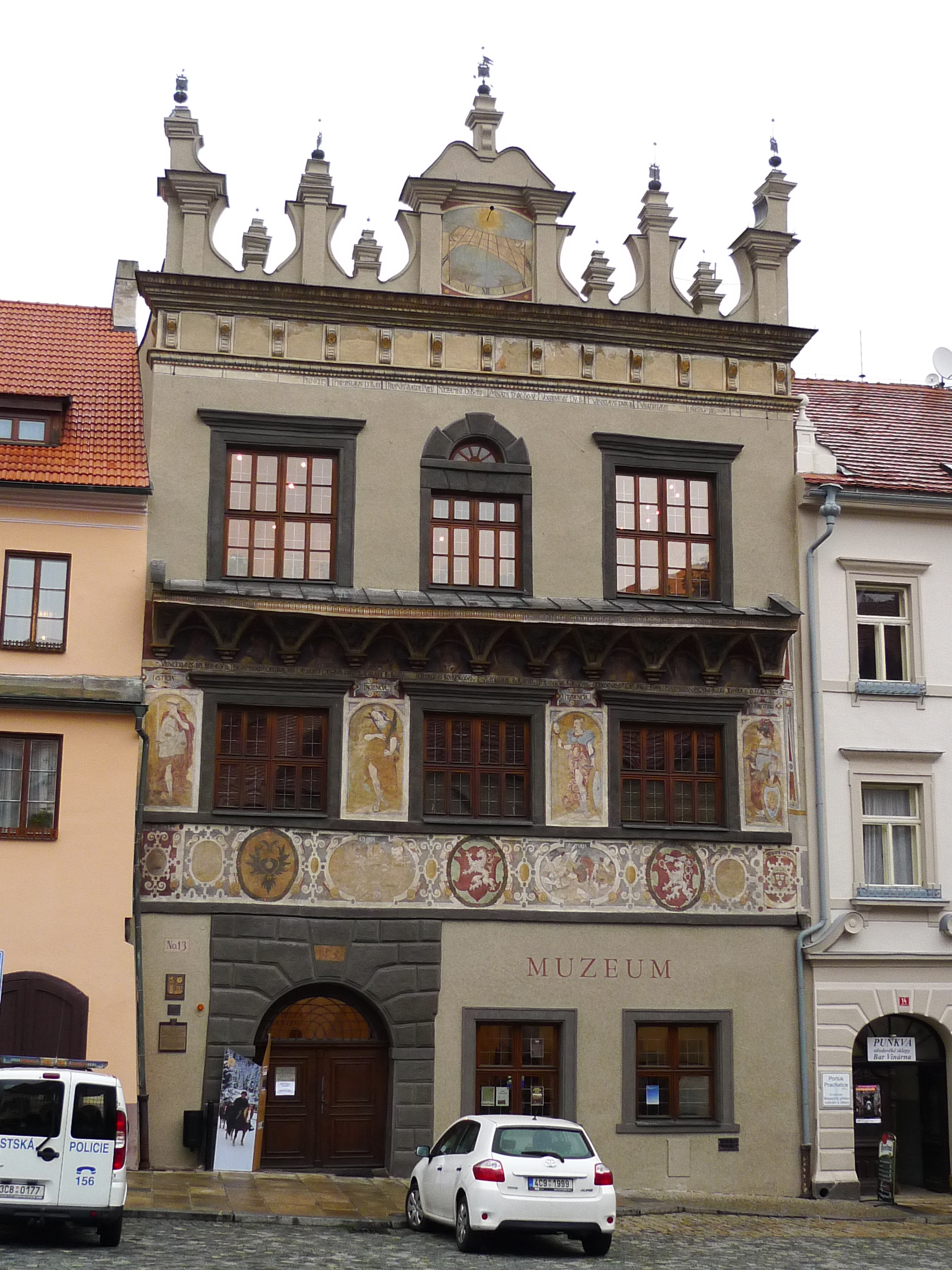 Sitrův dům, Velké náměstí 13, Prachatice I, Prachatice.